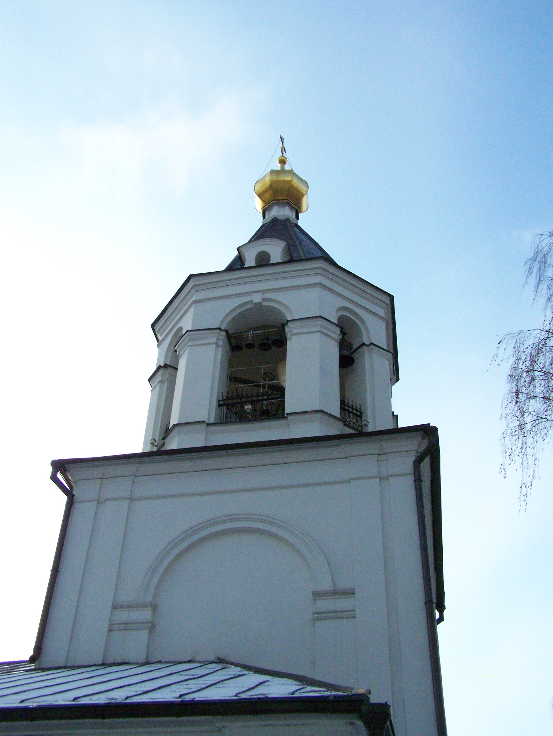 Храм Ризоположения Пресвятой Богородицы в Леонов